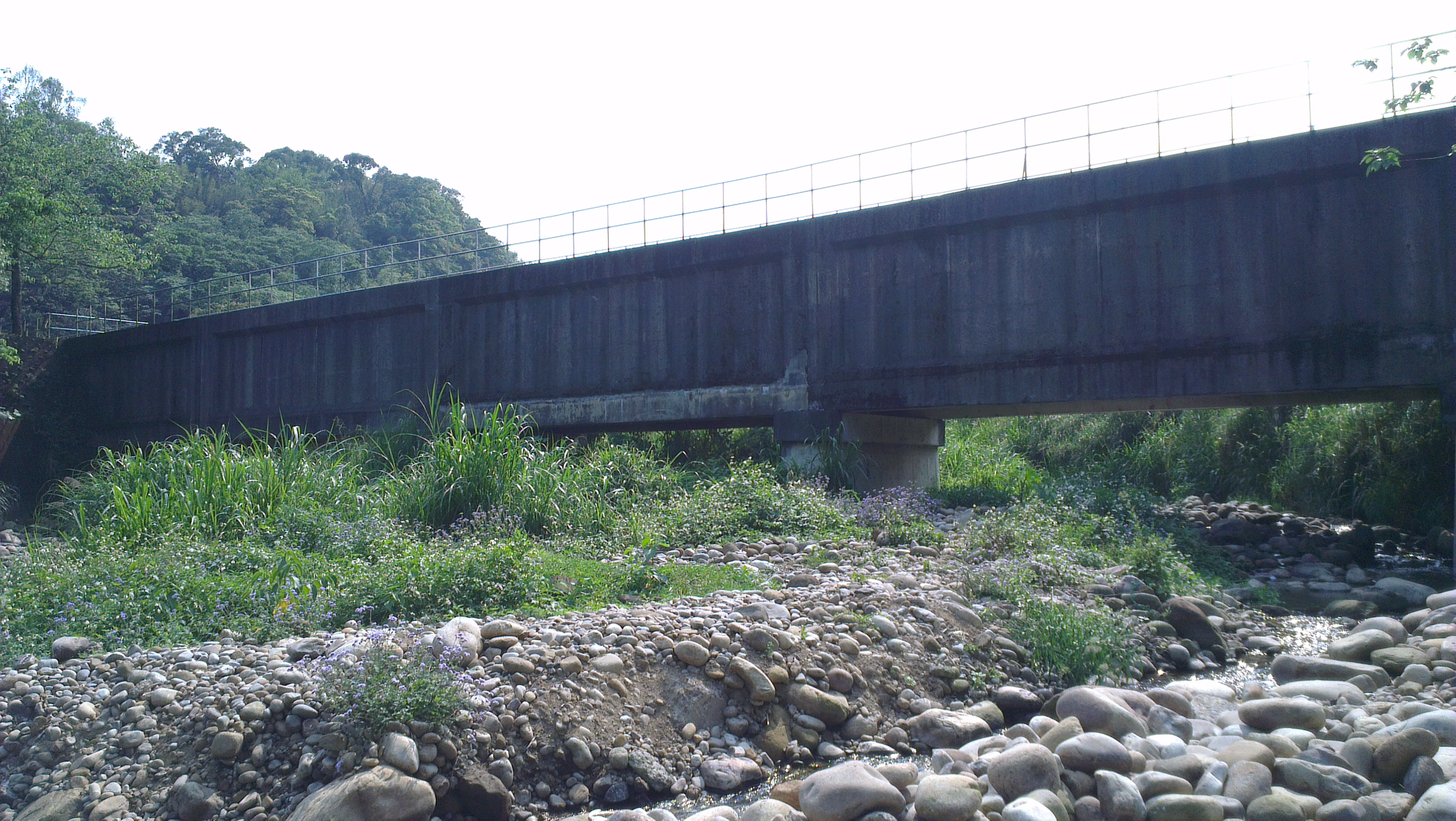 中文（台灣）: 石門大圳過水橋